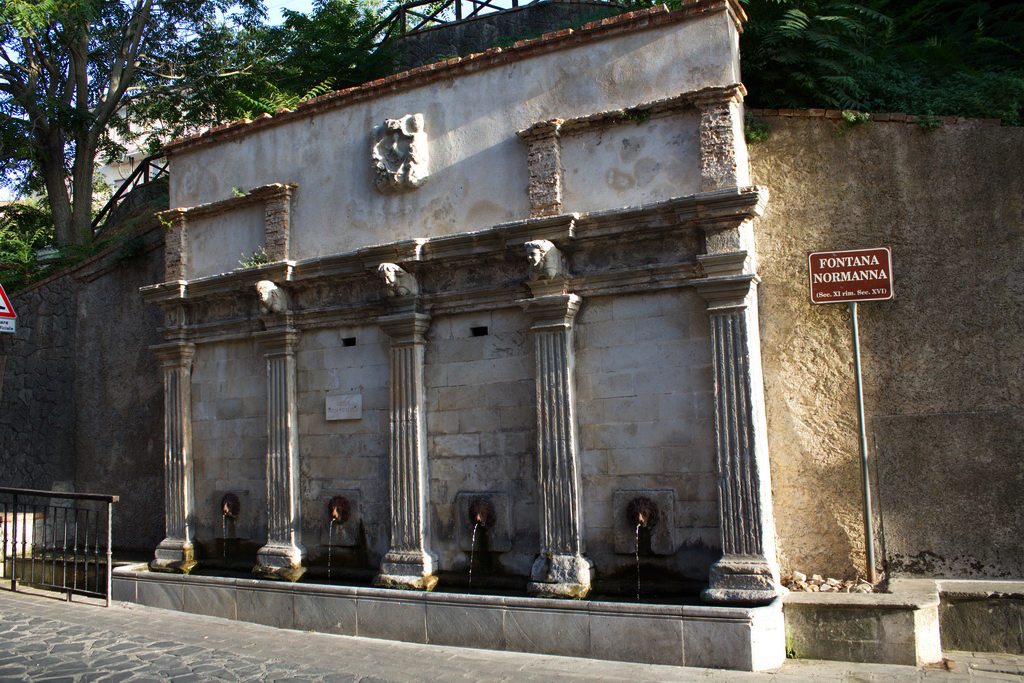 Fontana di Sikelgaita This is a photo of a monument which is part of cultural heritage of Italy.